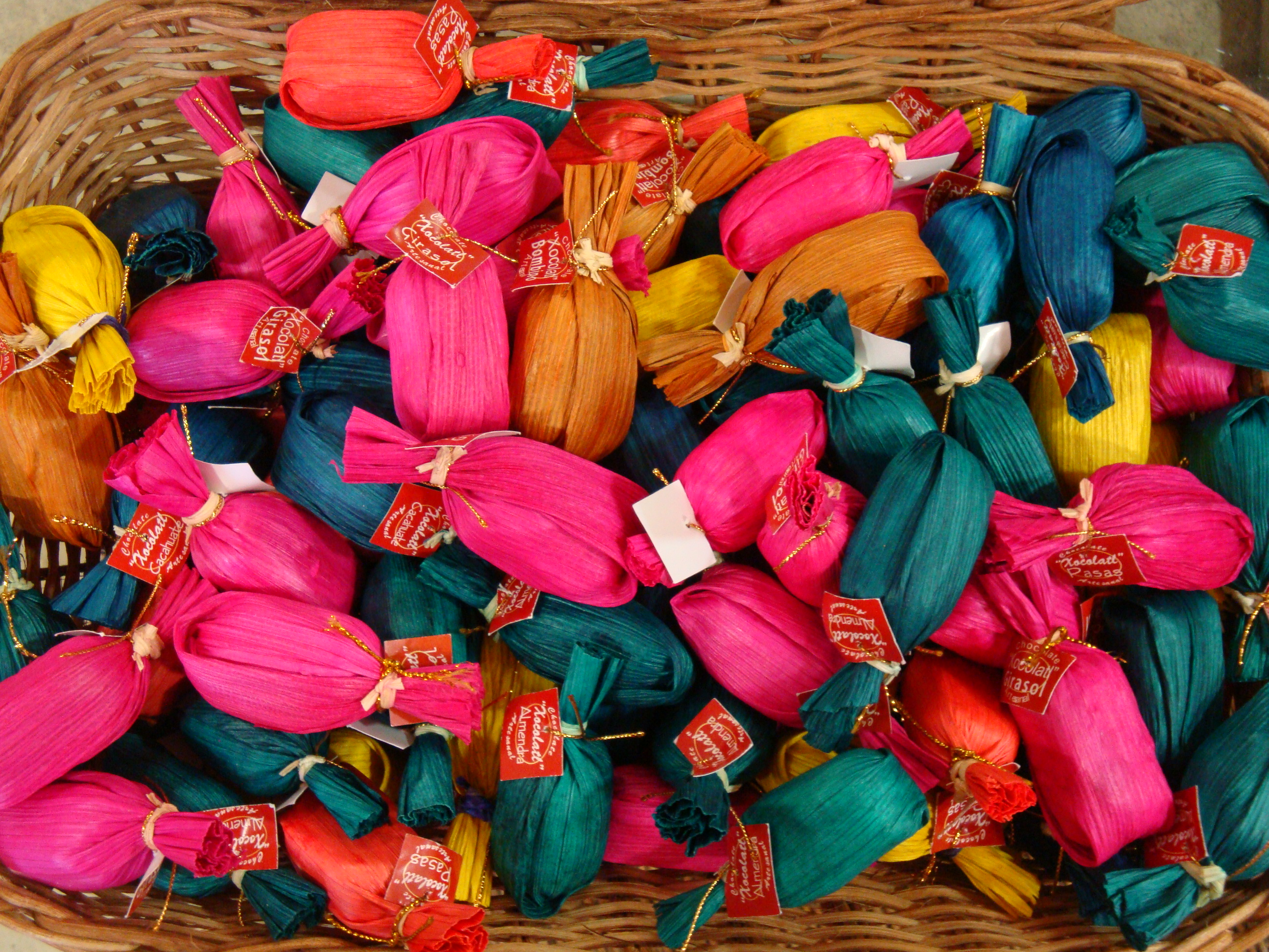 Chocolates elaborados en la ciudad de Comalcalco, Tabasco, México